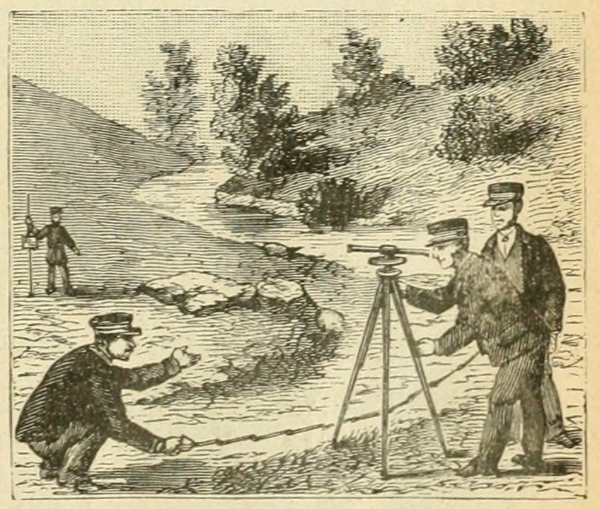 Le tour de la France par deux enfants, par George Bruno, manuel scolaire, édition de 1904.